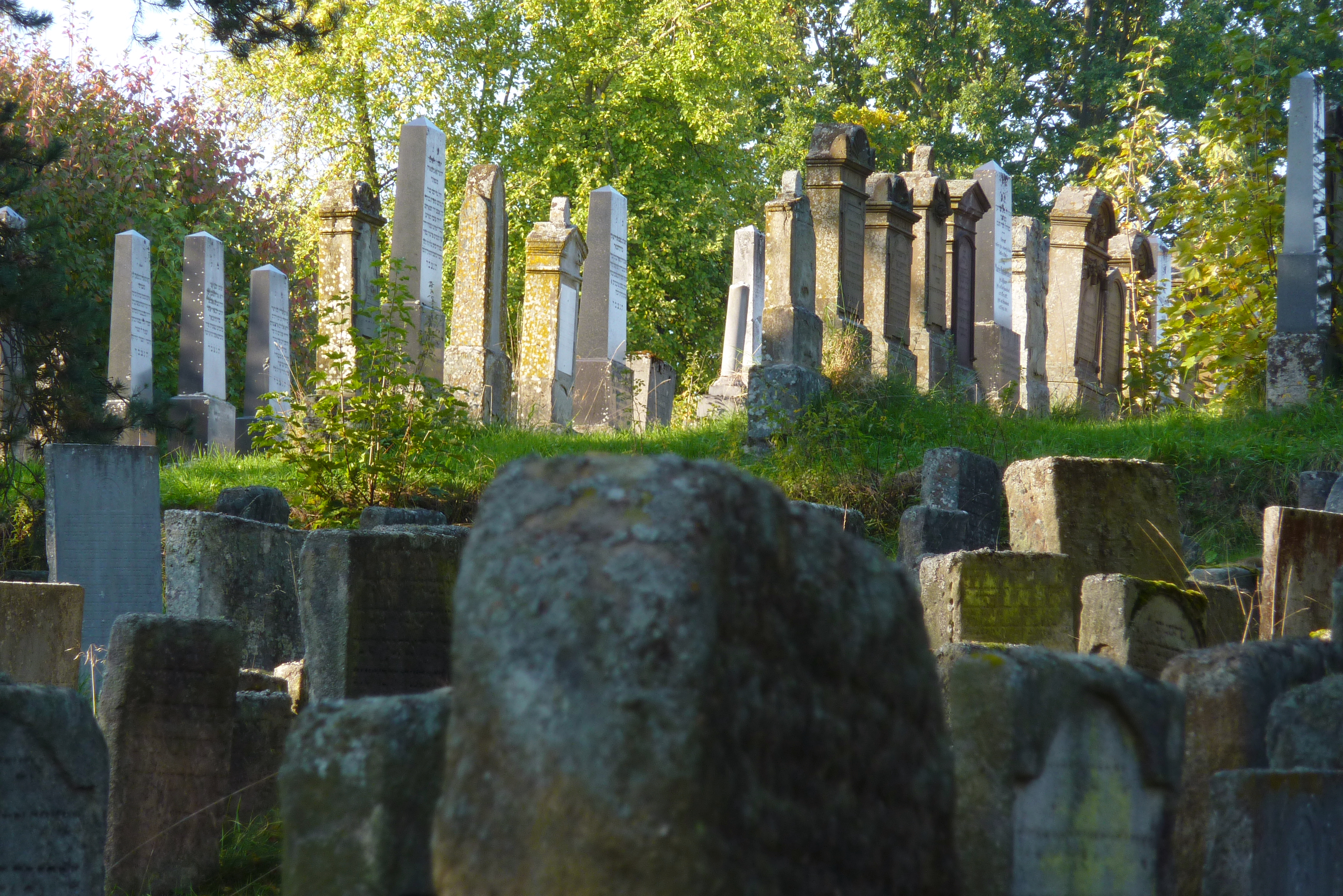 Jüdischer Friedhof in Georgensgmünd im Landkreis Roth (Bayern/Deutschland)